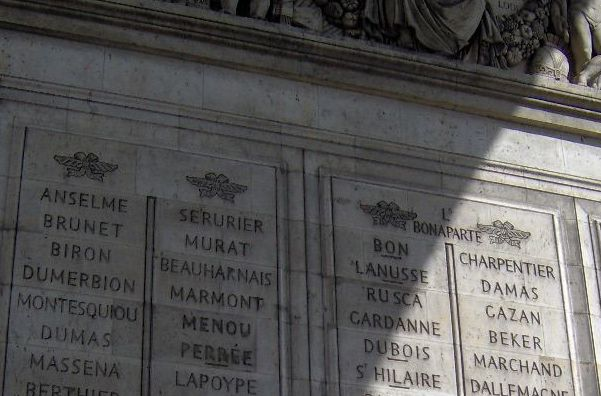 Arc de Triomphe